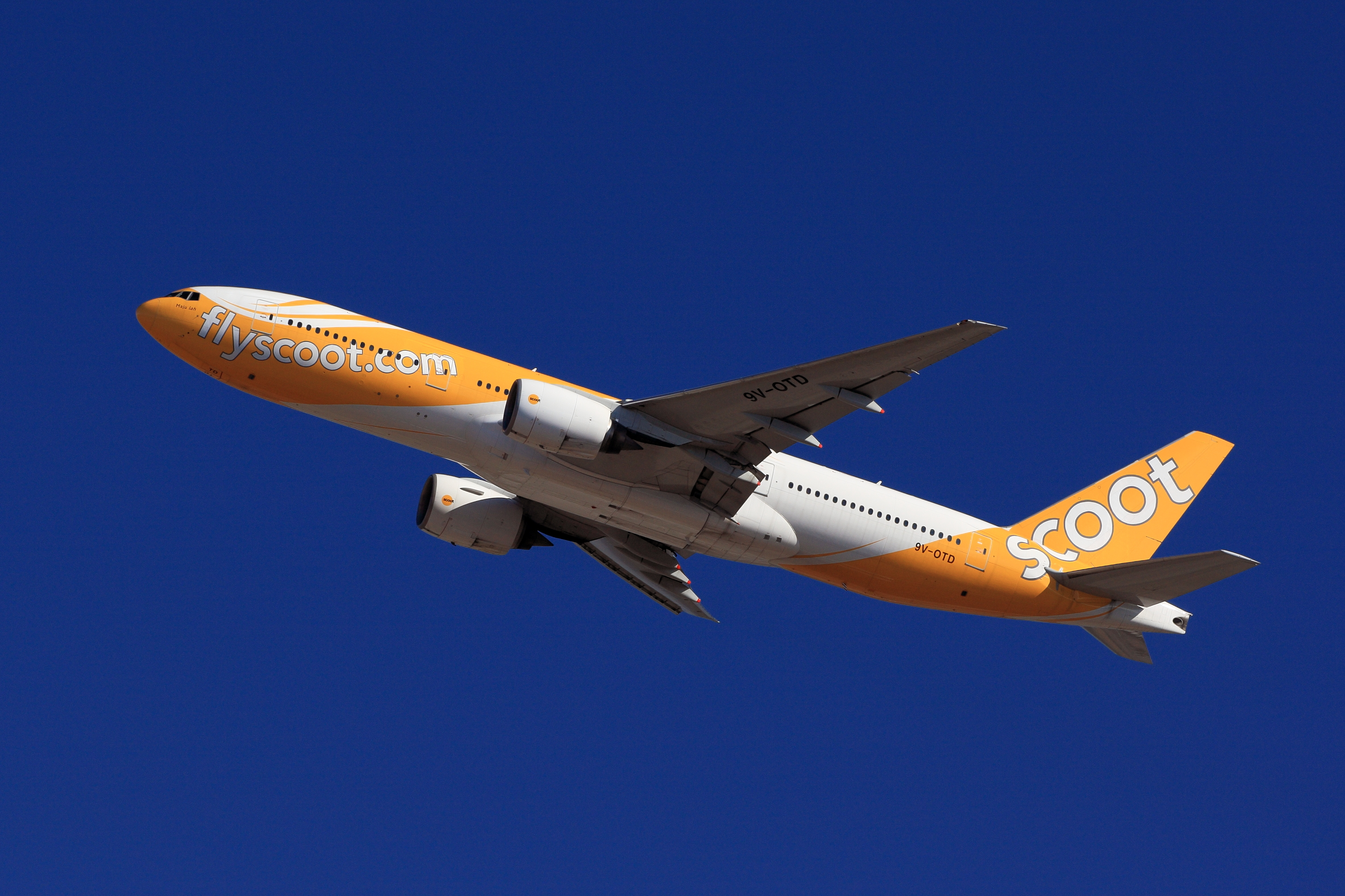 成田国際空港で撮影された、ScootのBoeing777-200型機